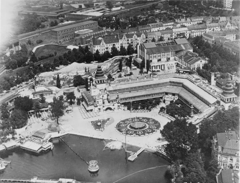 Berlin Lunapark - Luftaufnahme - 8.4.1935